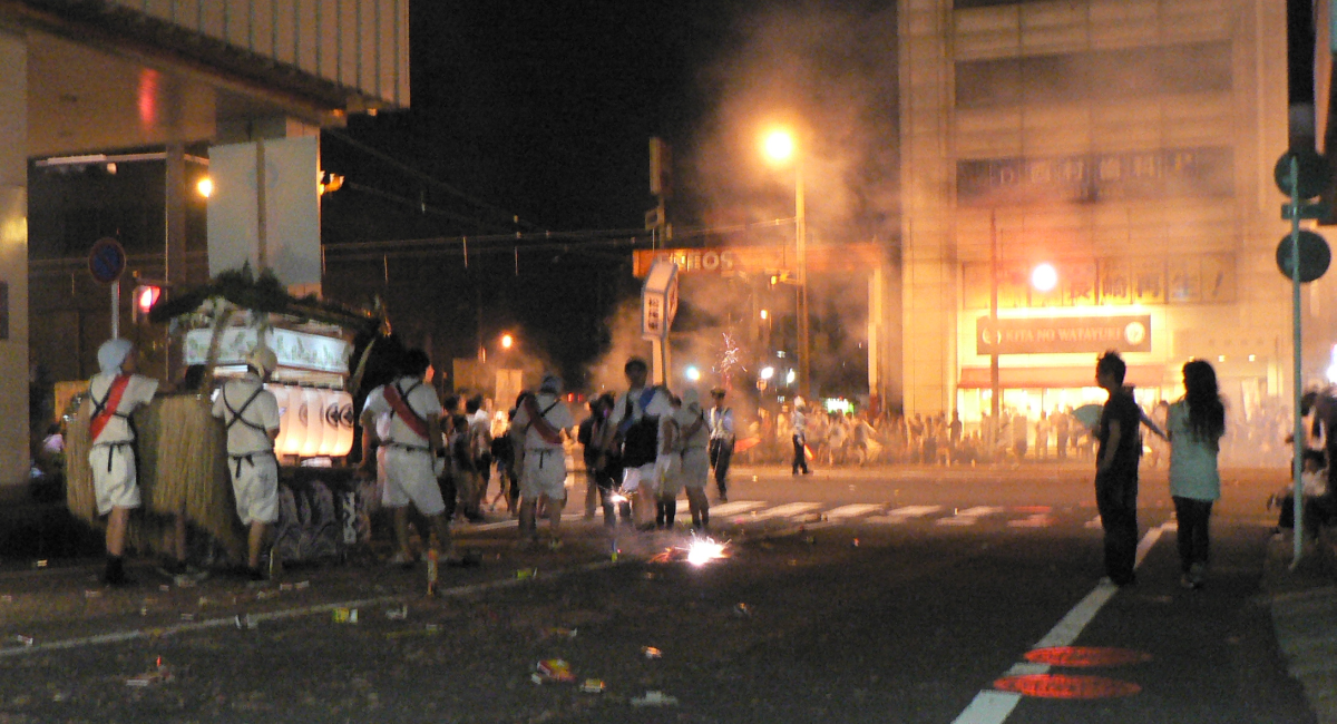 2010年の精霊流しの様子。舟が集まる五島町付近にて。大量の爆竹が鳴らされ、煙が立ちこめる。